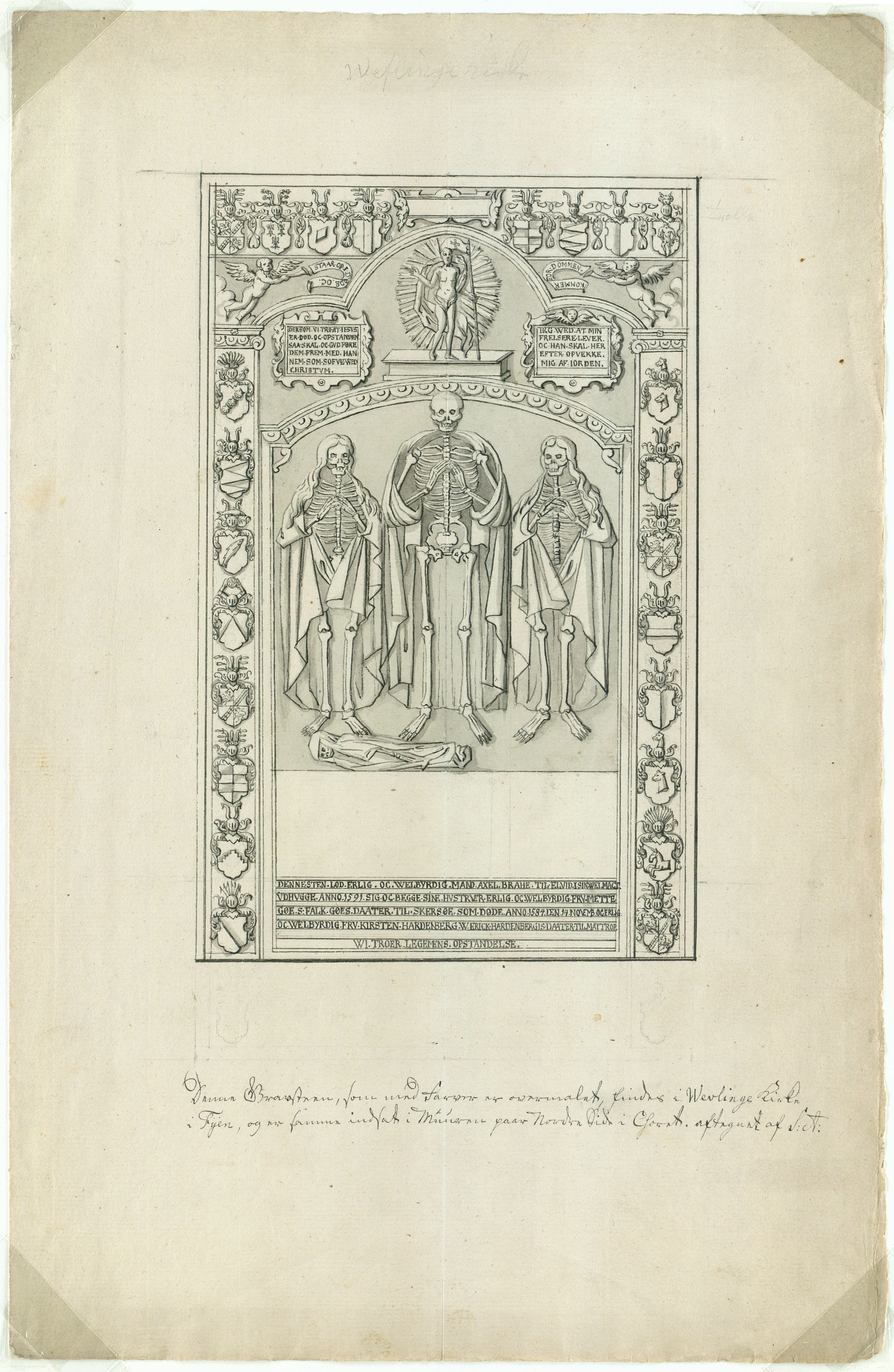 Axel Brahe og hustruerne Mette Gøye og Kirsten Hardenbergs gravsten